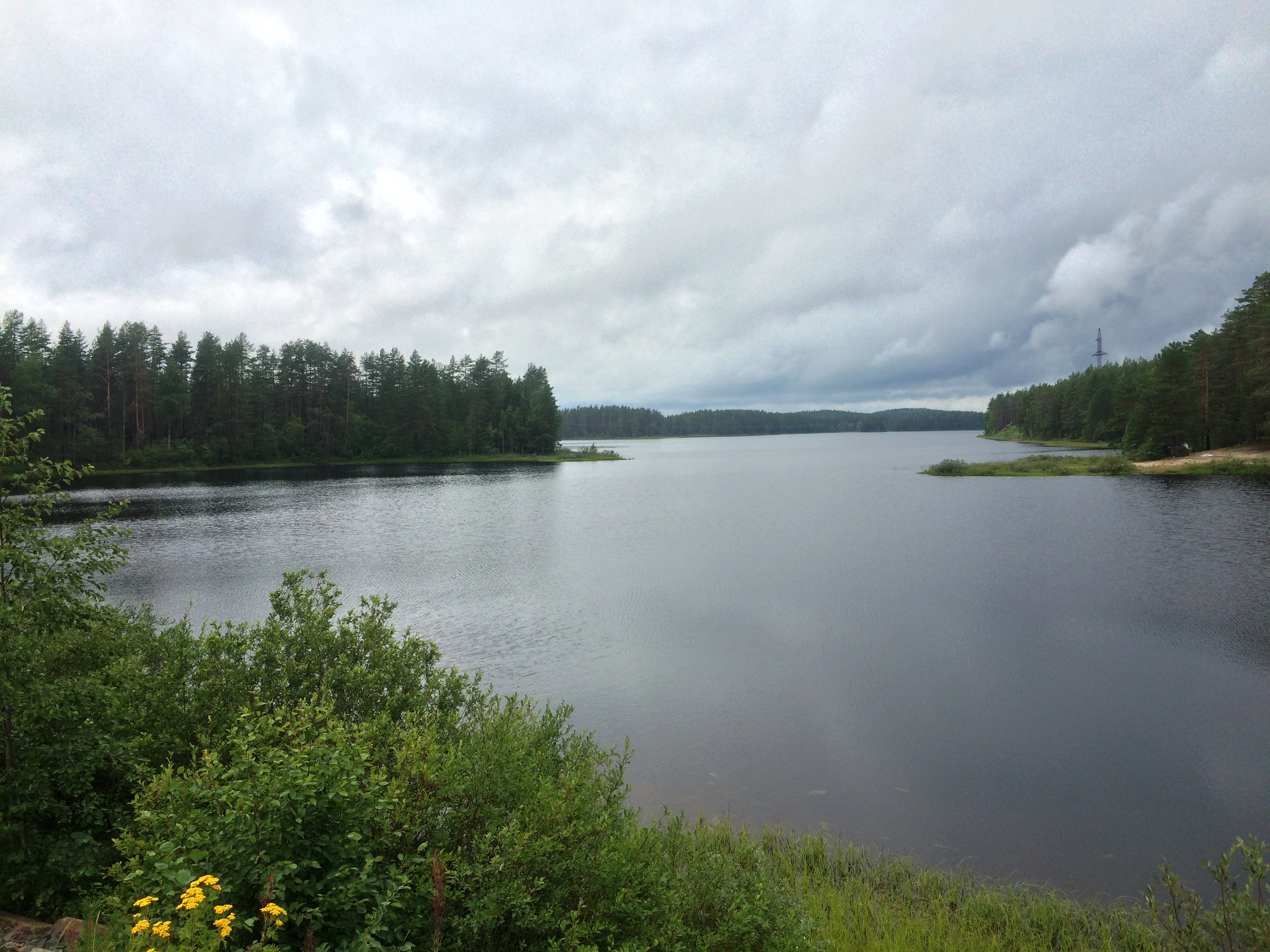 Салменъярви